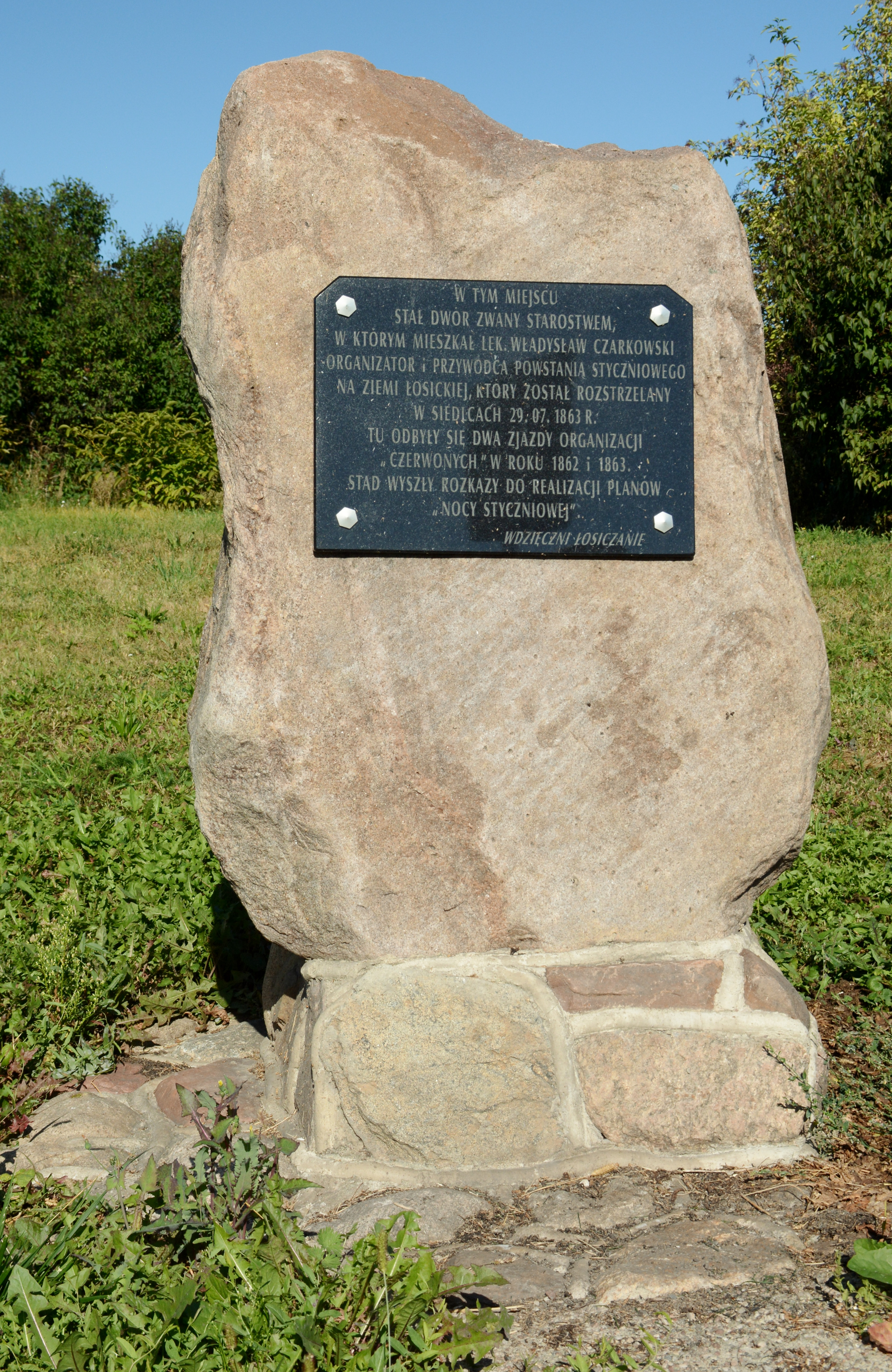 Łosice, Poland